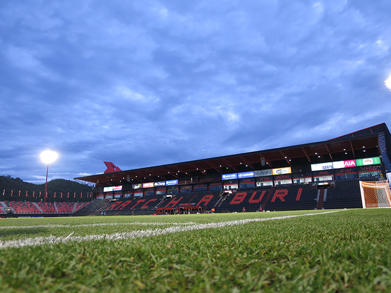 Ratchaburi, Mitr Phol Stadium 2017